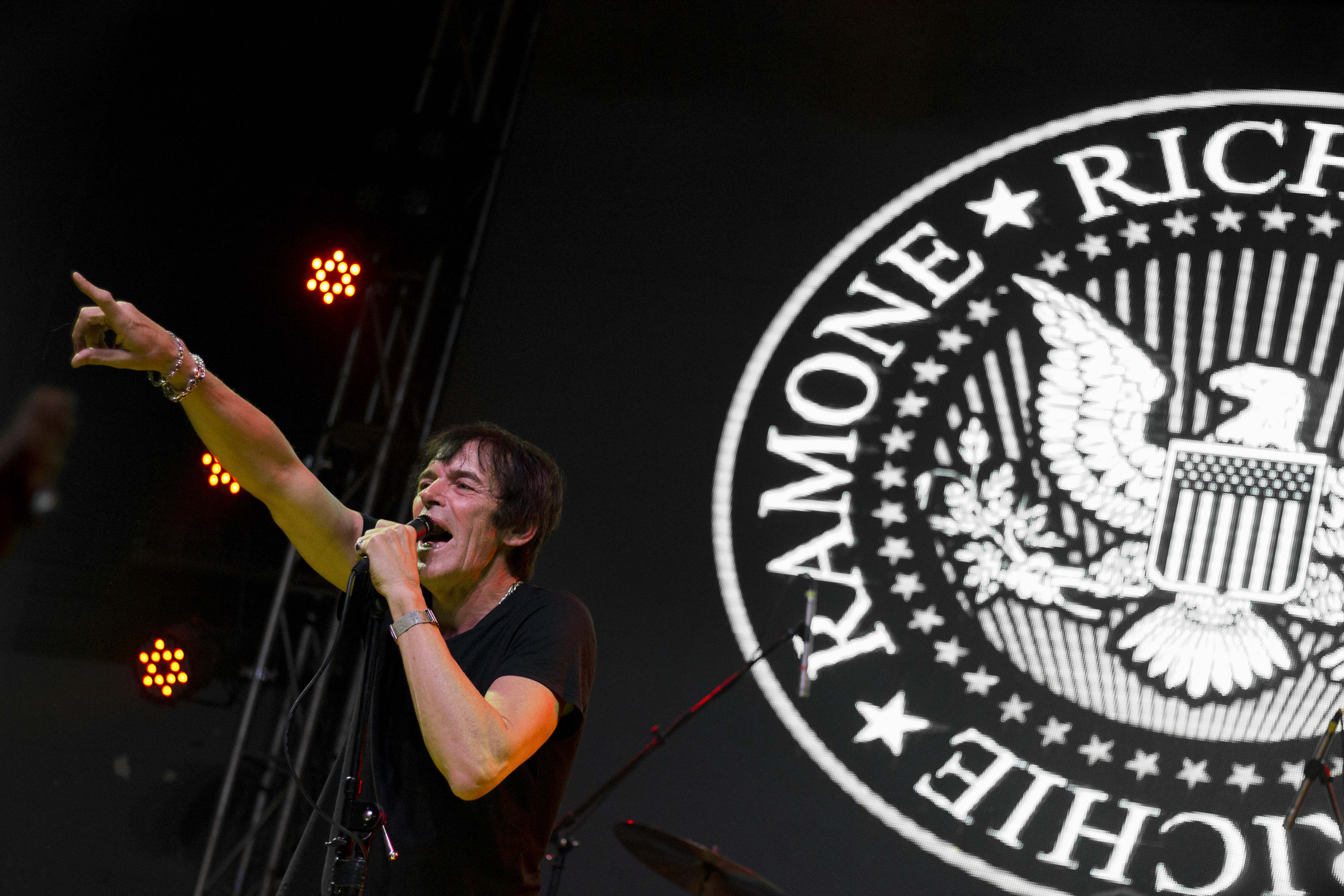 Richie Ramone, Chile 2018 ©MarianoBeuses